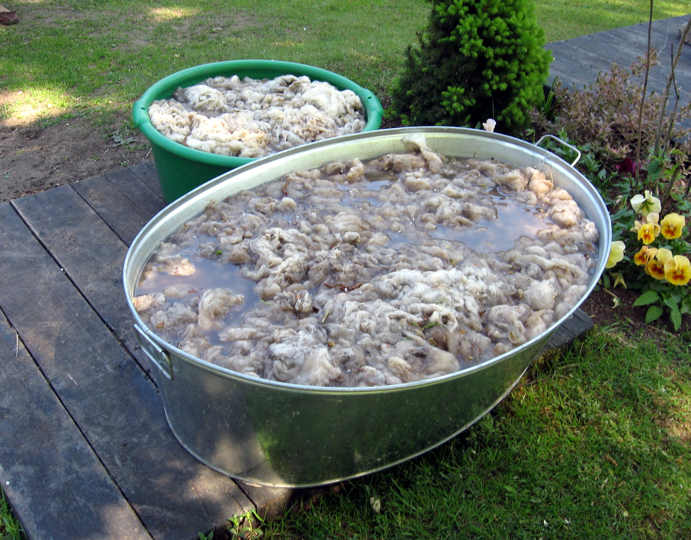 Ručně zpracovávaná vlna